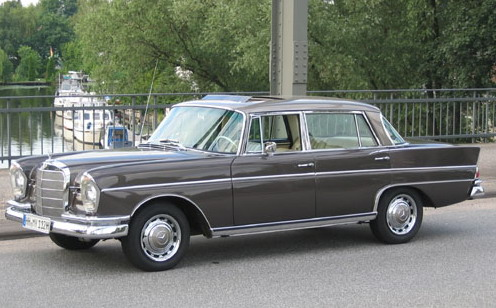 "300SE lang" in Zweifarblackierung: 728 beigegraumetallic über 461 bronzebraunmetallic.